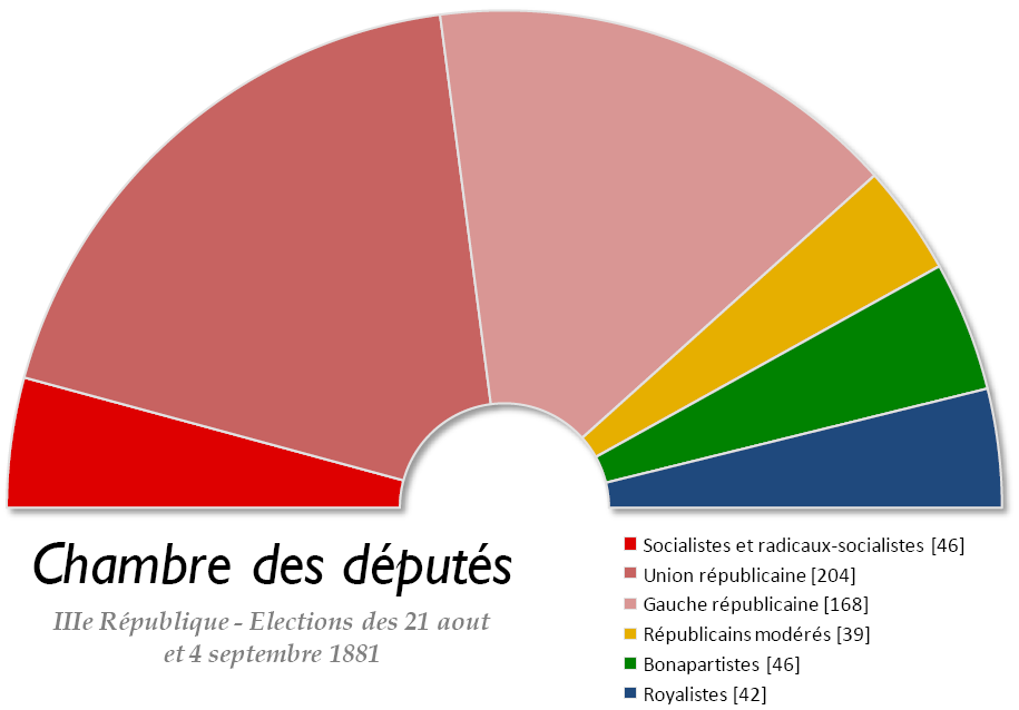 Chambre des députés française issue des élections législatives de 1881